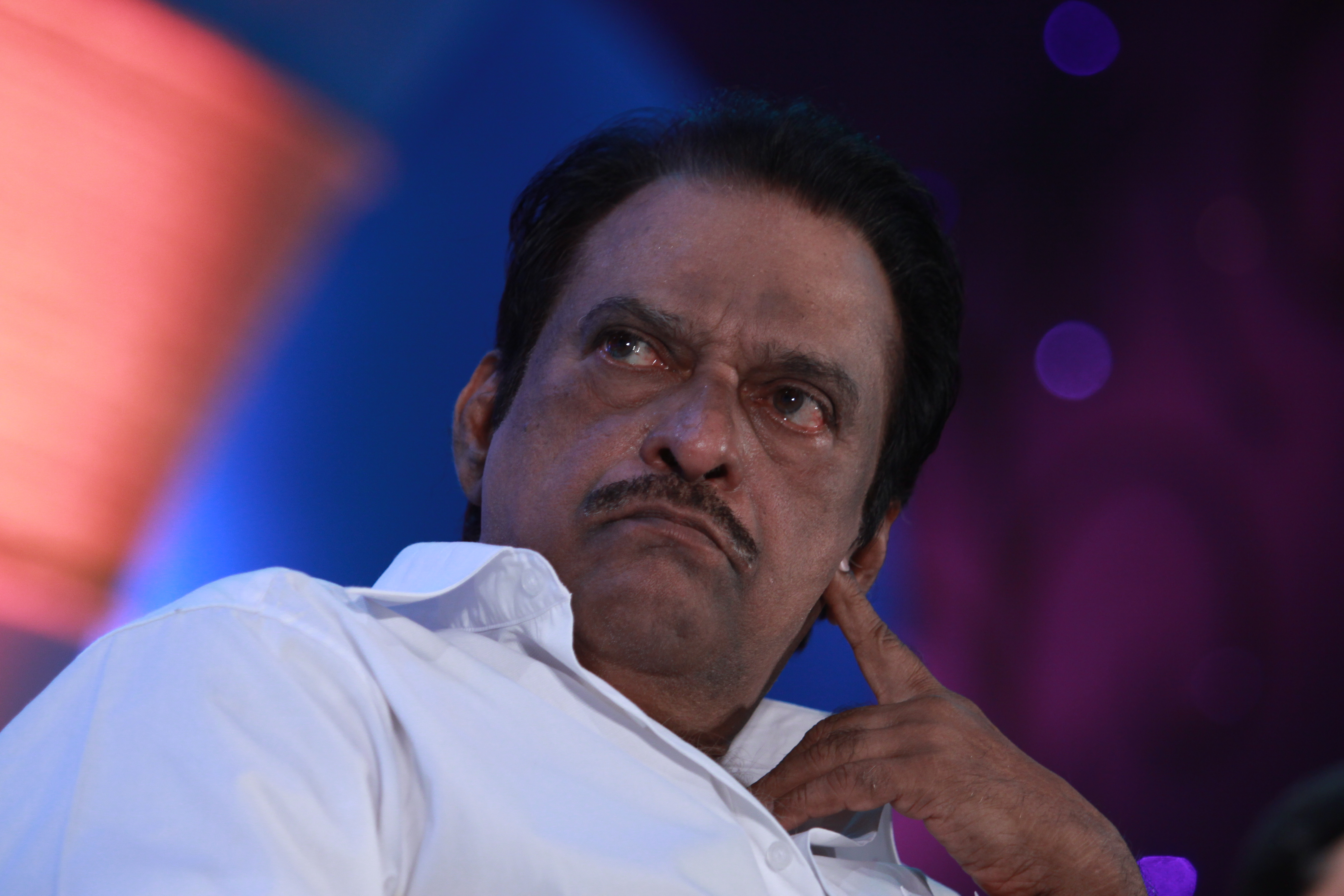 2011ല്‍